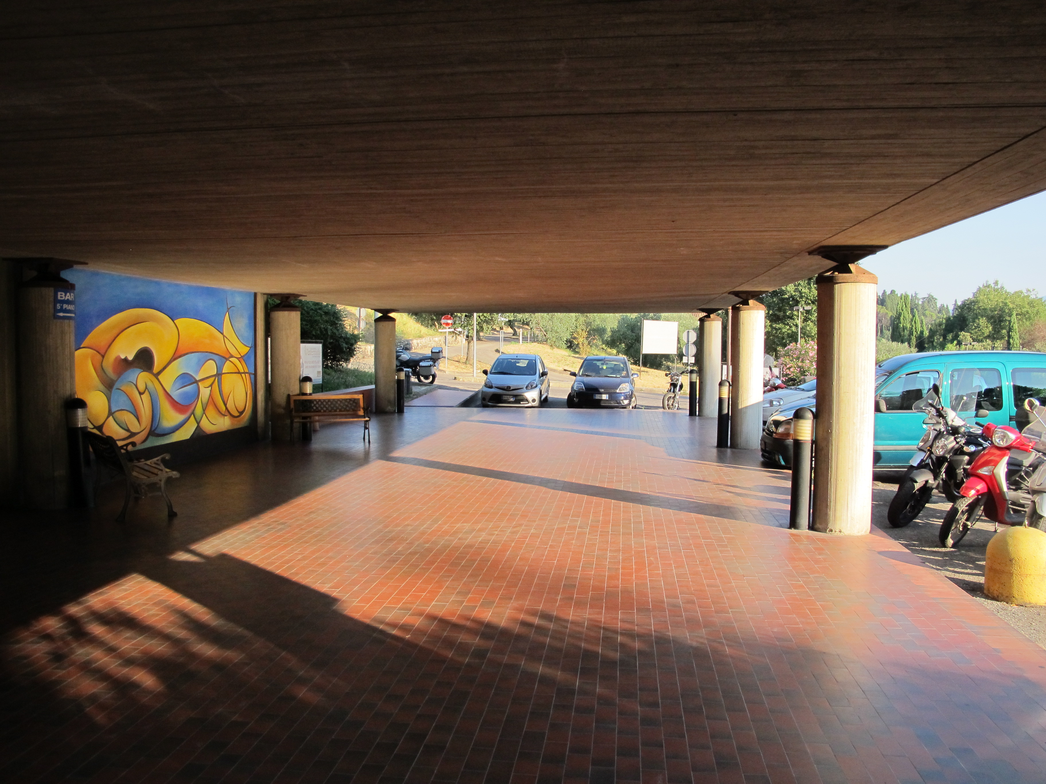 Ospedale Pietro Palagi, Florence